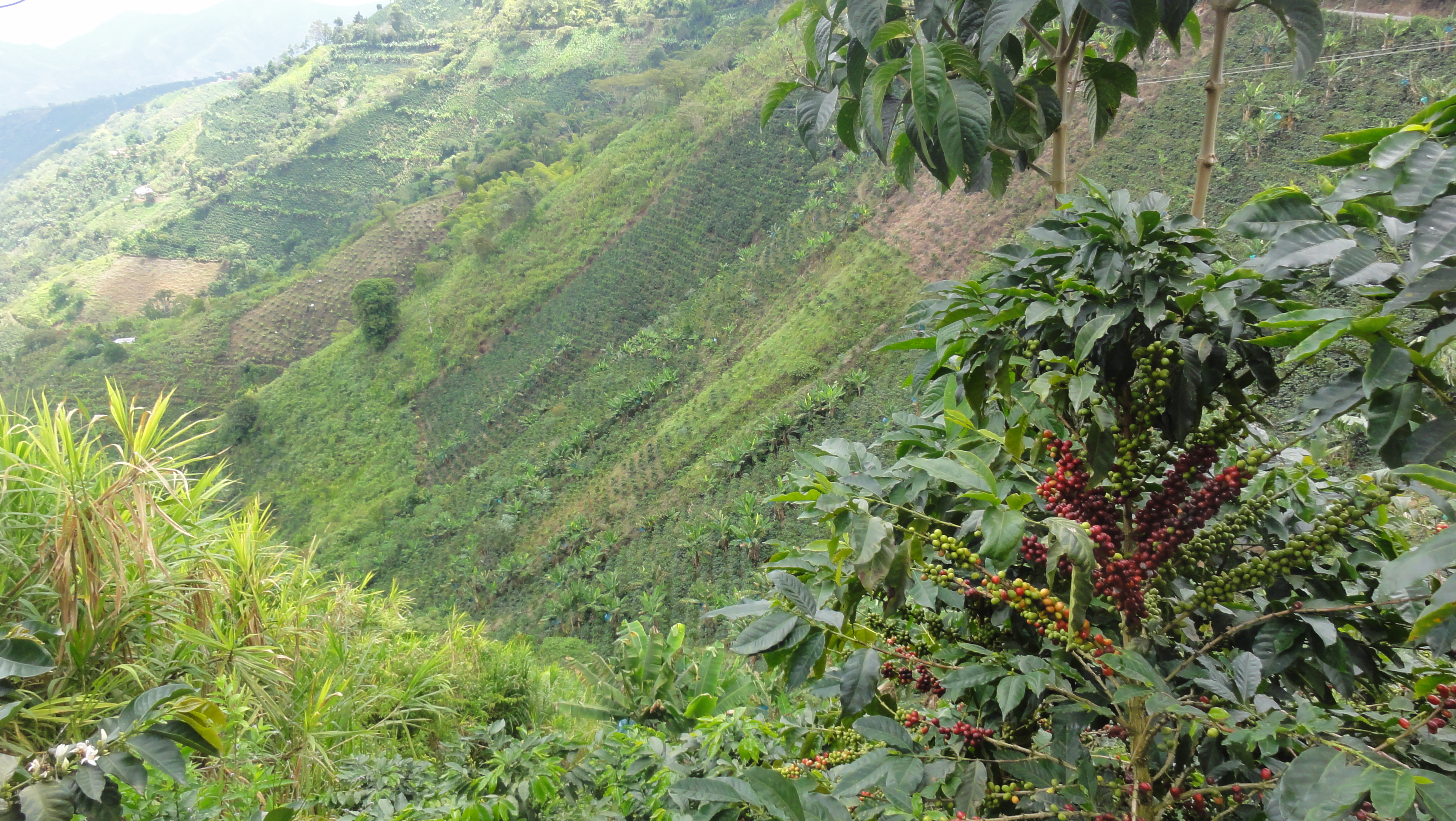 Vía Ansermanuevo a El Águila, cruce a la vereda Santa Helena (Granario), aproximadamente a 2 Km al suroeste del parque principal de El Águila: vista de zona cafetera. El Águila, Valle del Cauca, Colombia.